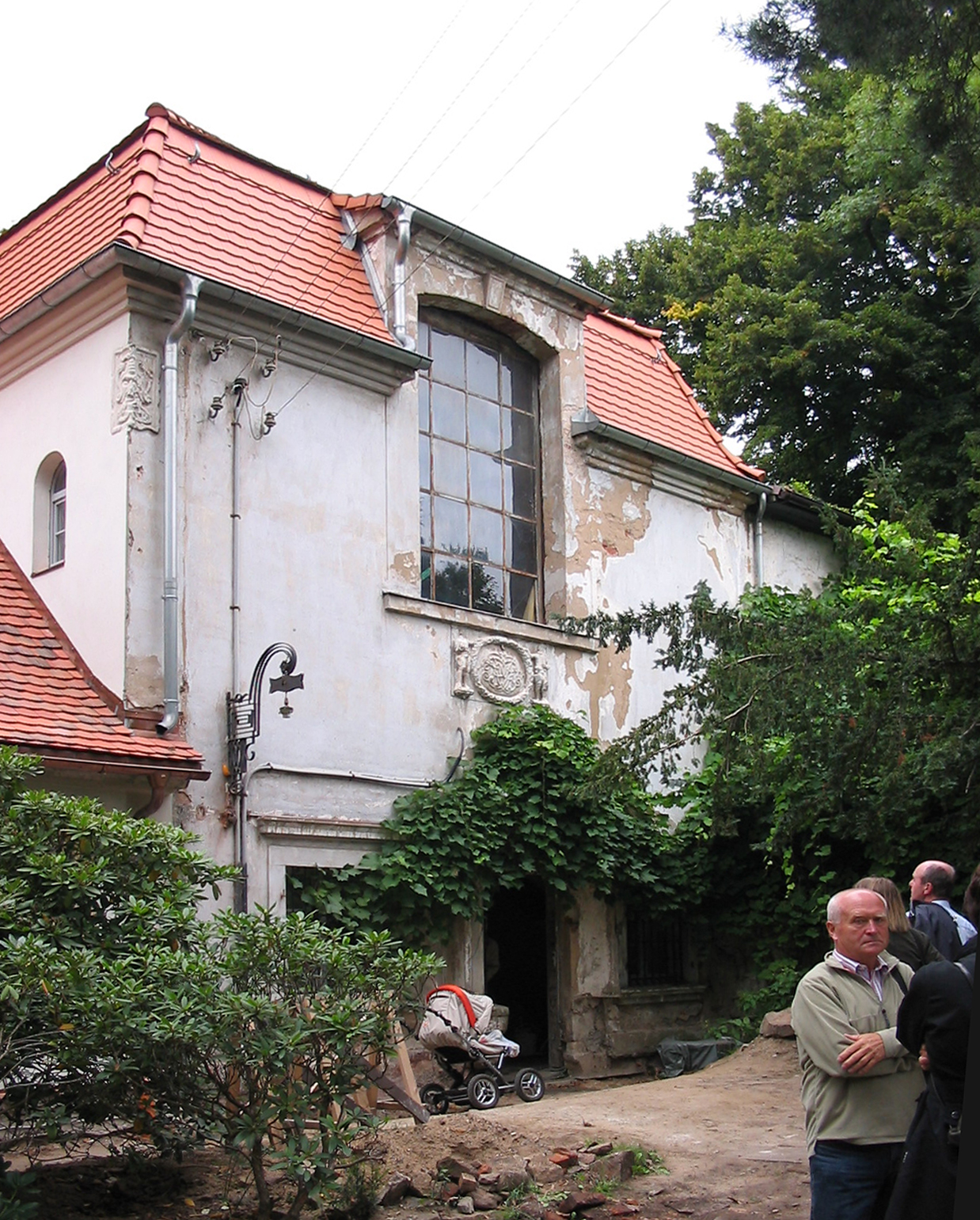 Donadini-Haus, Atelierbau am Tag des offenen Denkmals